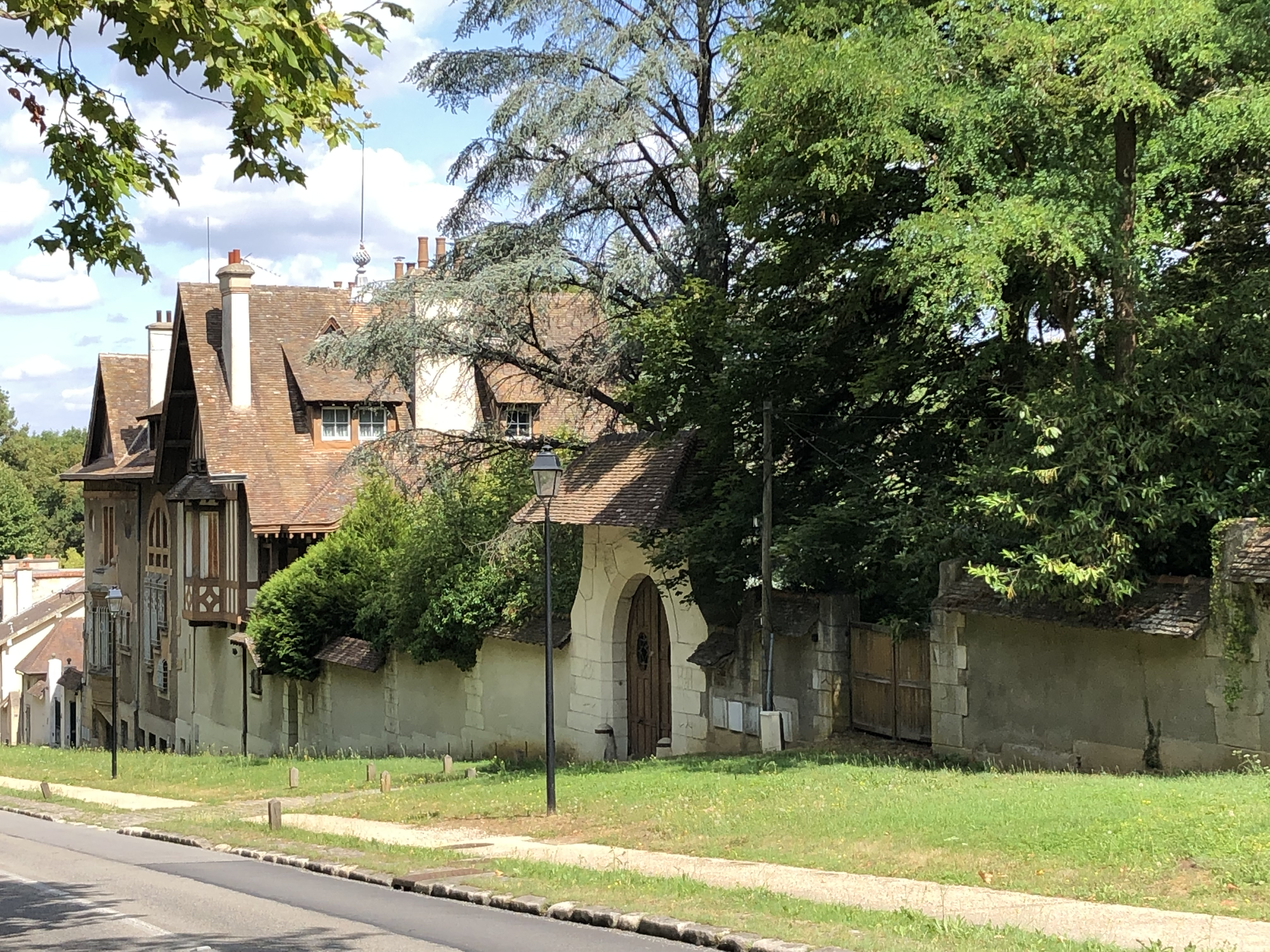 Le manoir du Coeur Volant à Louveciennes